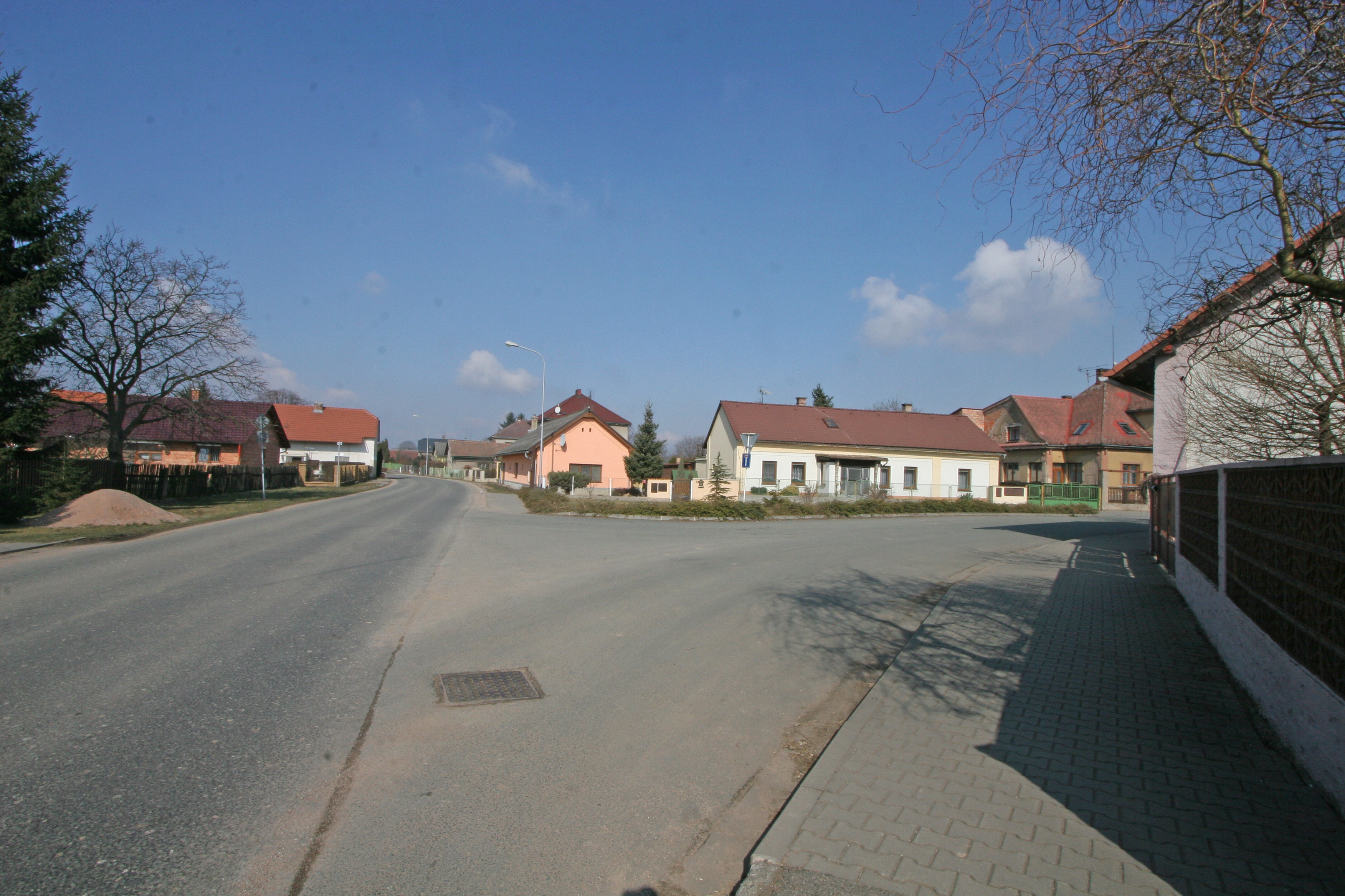 Urbanice čp. 39